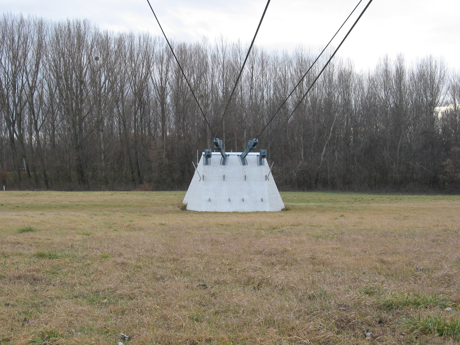 Ankerblock Barbarabrücke in Mannswörth